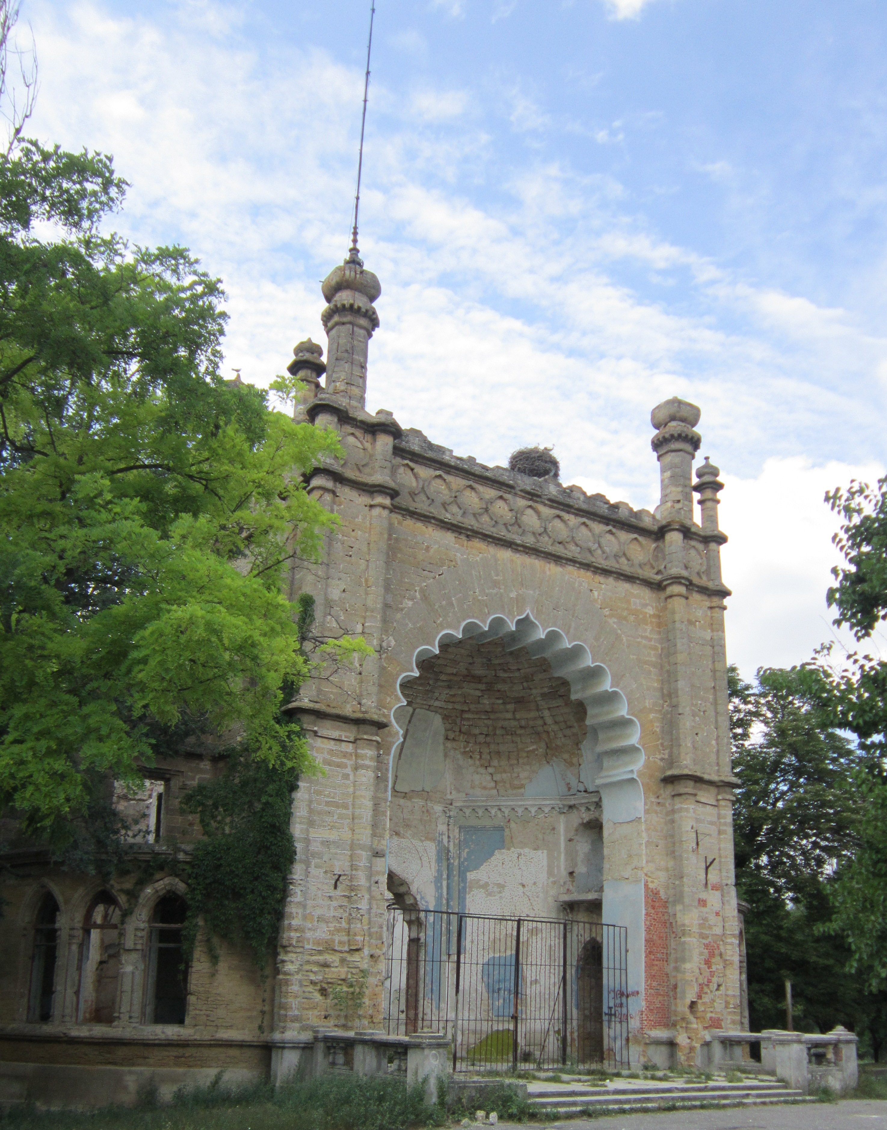 Садиба Куріса, с. Петрівка, Одеська область.